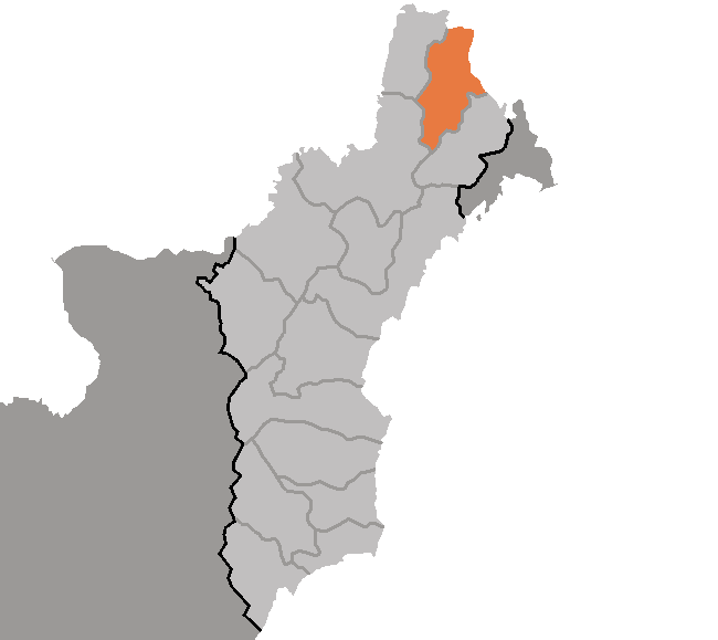 Map of Saepyol, Hamgyong-pukto, DPRK, 2006